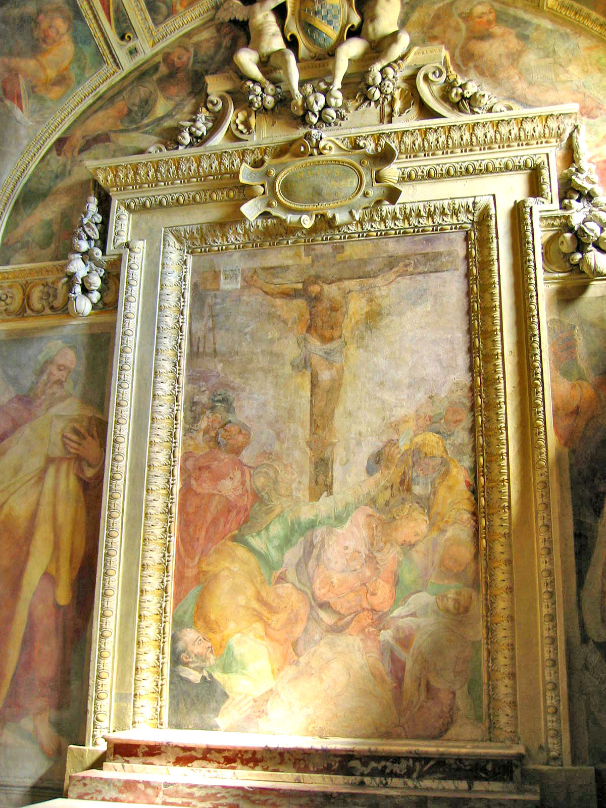 ”Il Crocifissione” (1556).Cappella Mattei, Chiesa di Santa Maria della Consolazione, Roma.